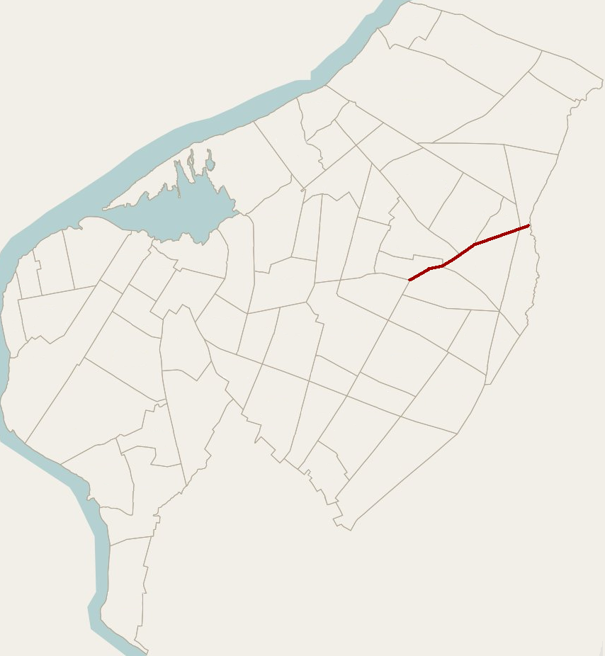 Avda. Aviadores del Chaco, Asunción, Paraguay